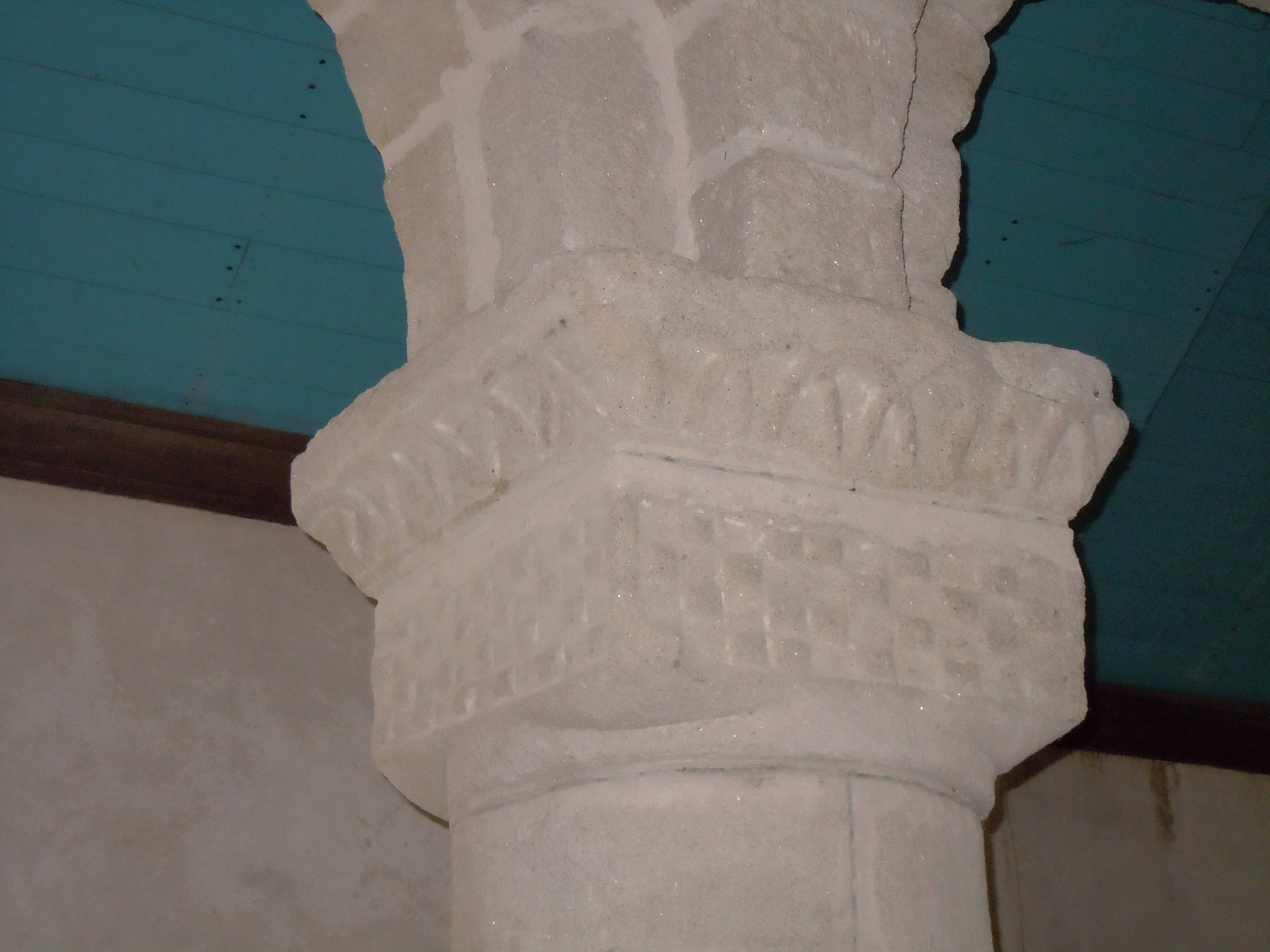 chapiteau cubique décoré de damiers, église saint-Pierre, commune de Ploërdut, France